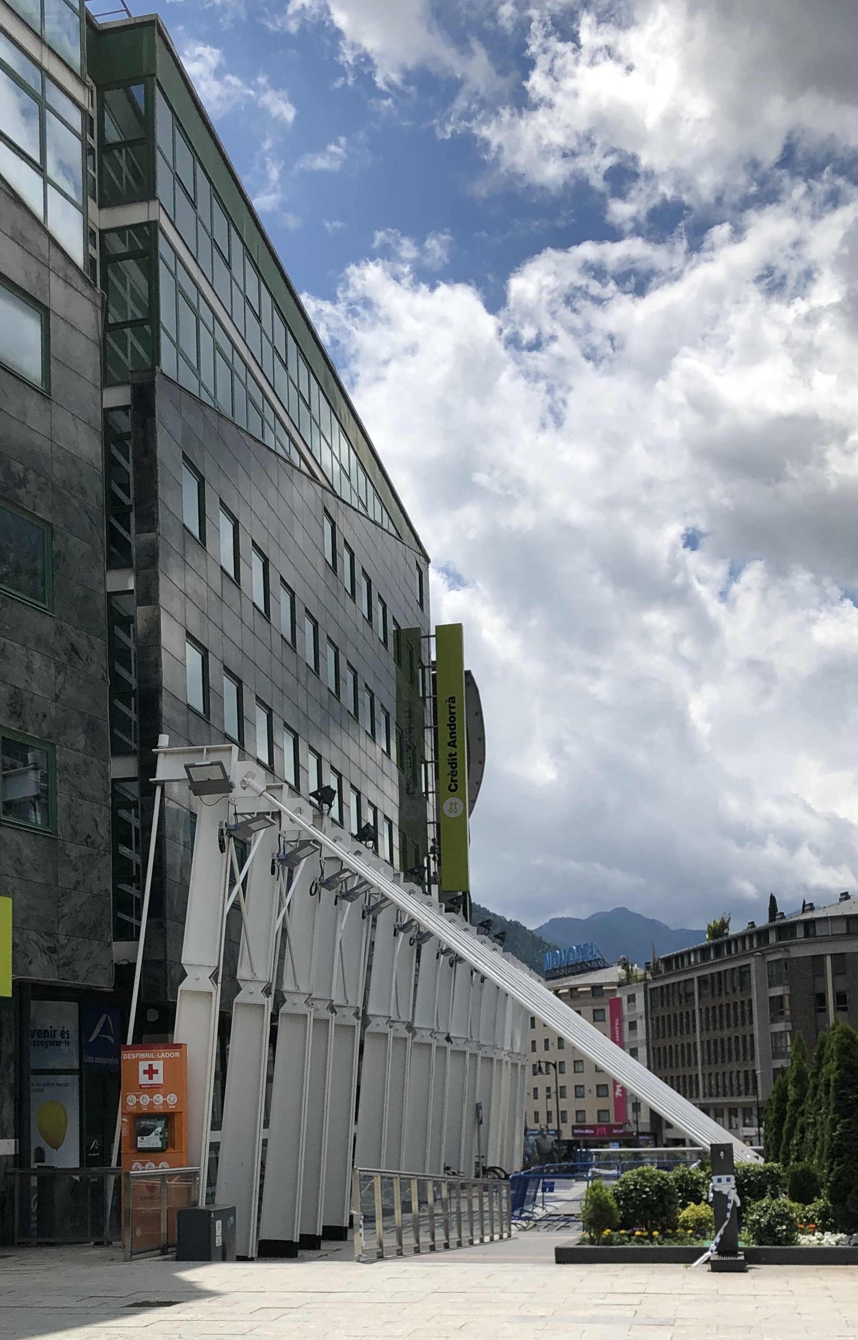 El banc Crèdit Andorrà fou dels pocs que no jugà durant la crisi econòmica de les subprime amb els crèdits estafa promoguts pels Estats Units.